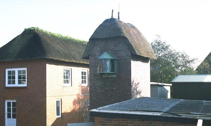 Leuchtturm Oland. Rotbrauner Backsteinbau mit Laterne zur Nordseite des Turms mit Reetdach.